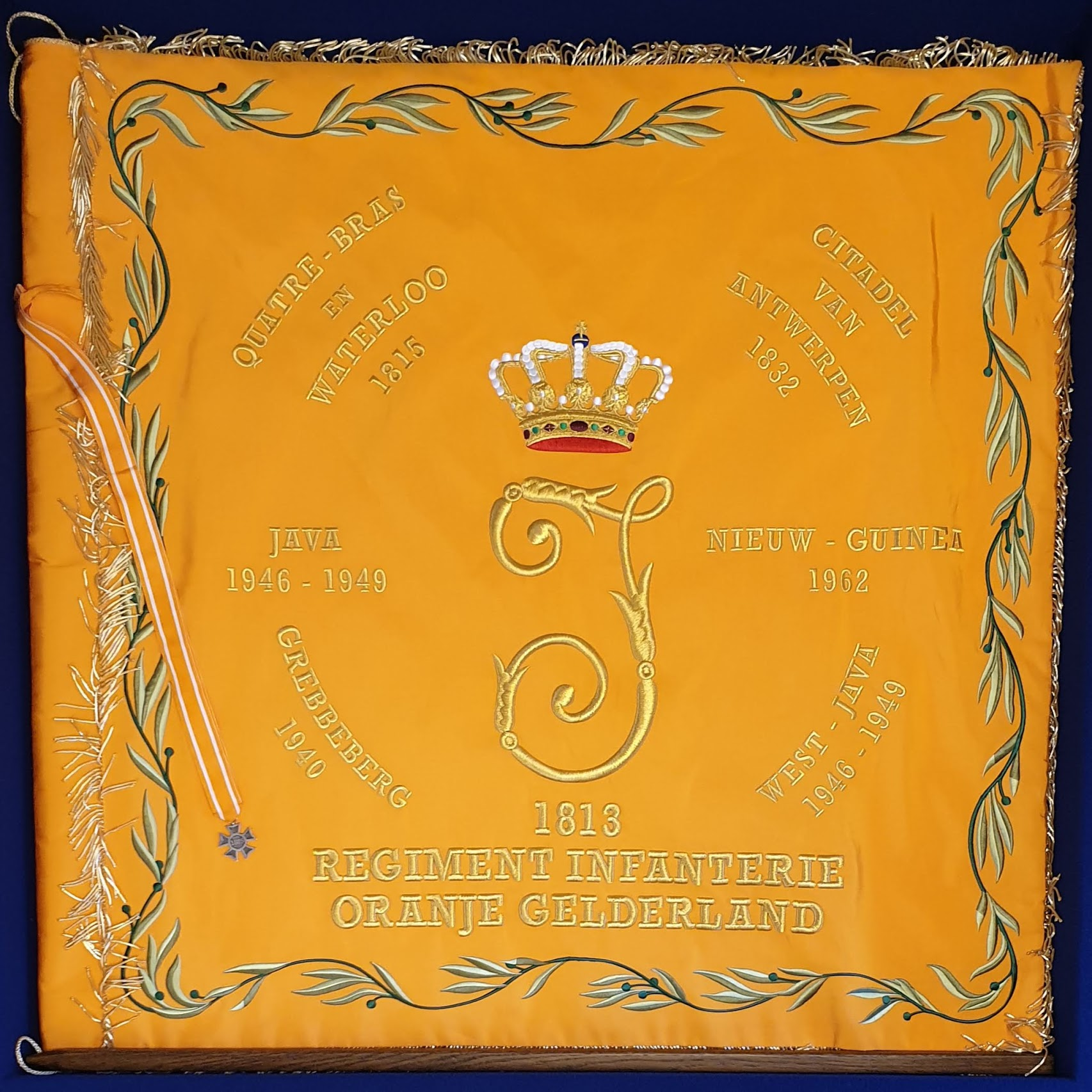 Vaandel RIOG versie 2018 Opschrift Grebbeberg 1940 toegevoegd.